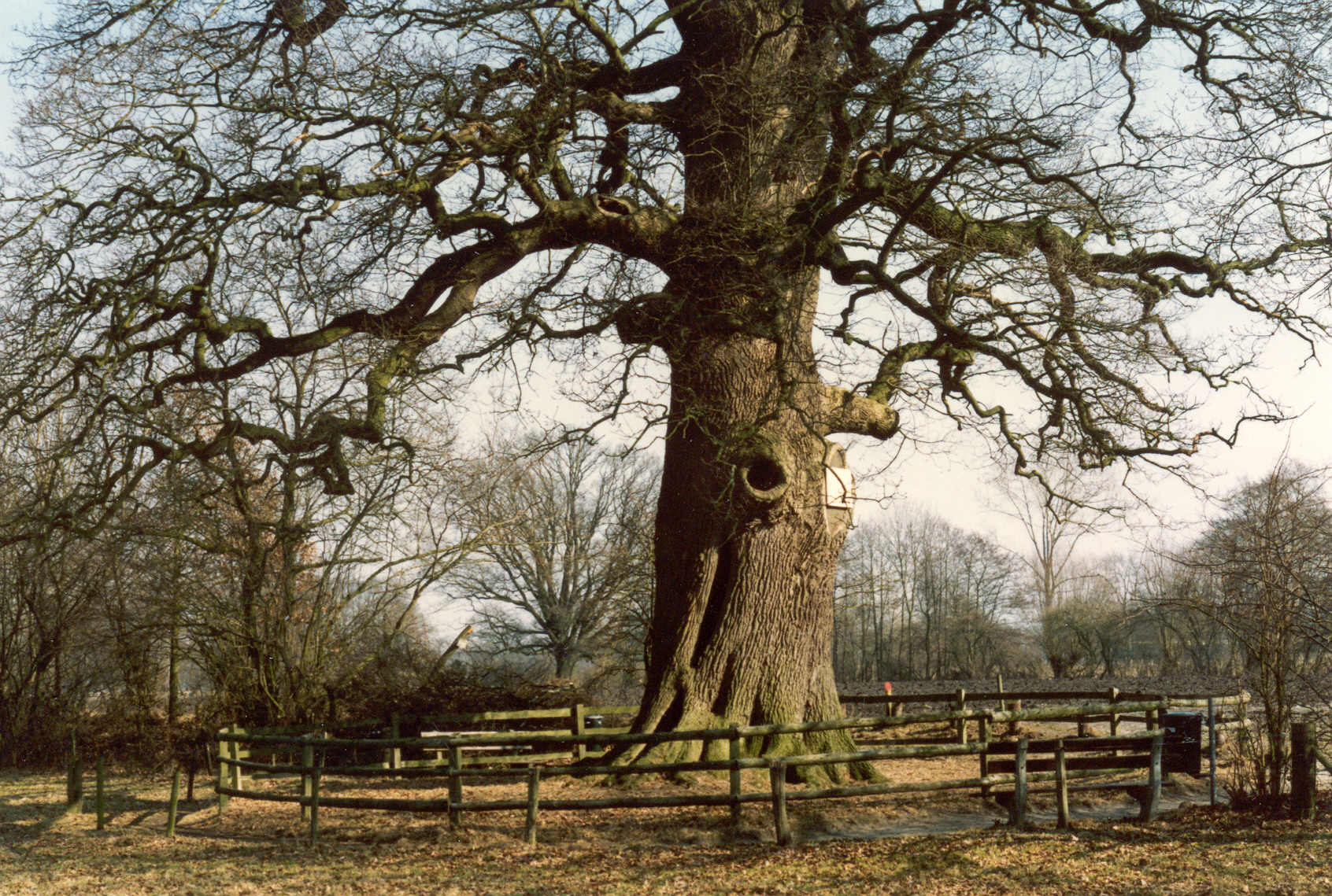 Zomereik van Verwolde, Laren (Gelderland) "de Dikke Boom" Stamomtrek 770 cm, leeftijd ongeveer 450 jaar.